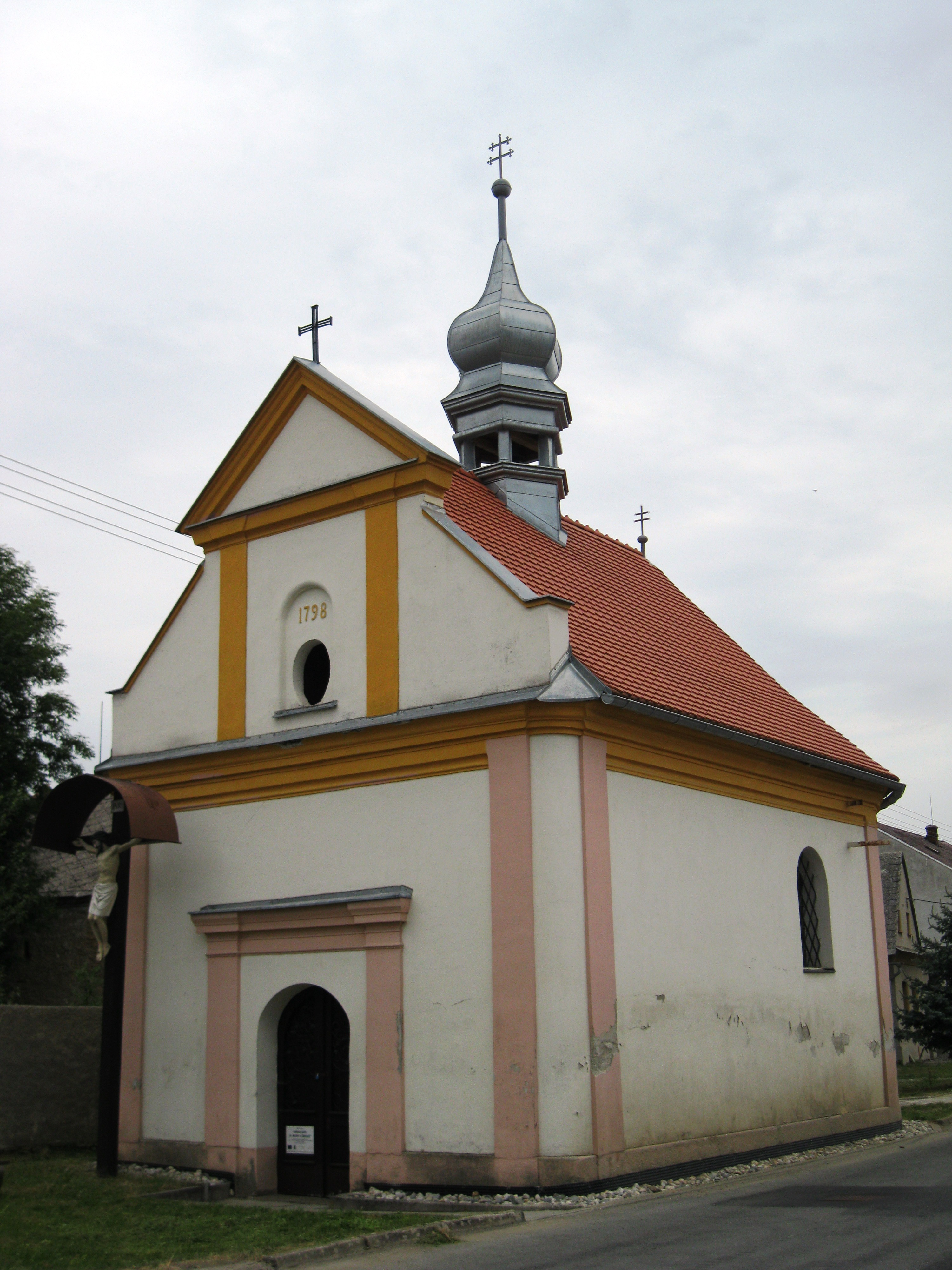 Kaple sv. Pavlíny (Červenka), náves, Červenka